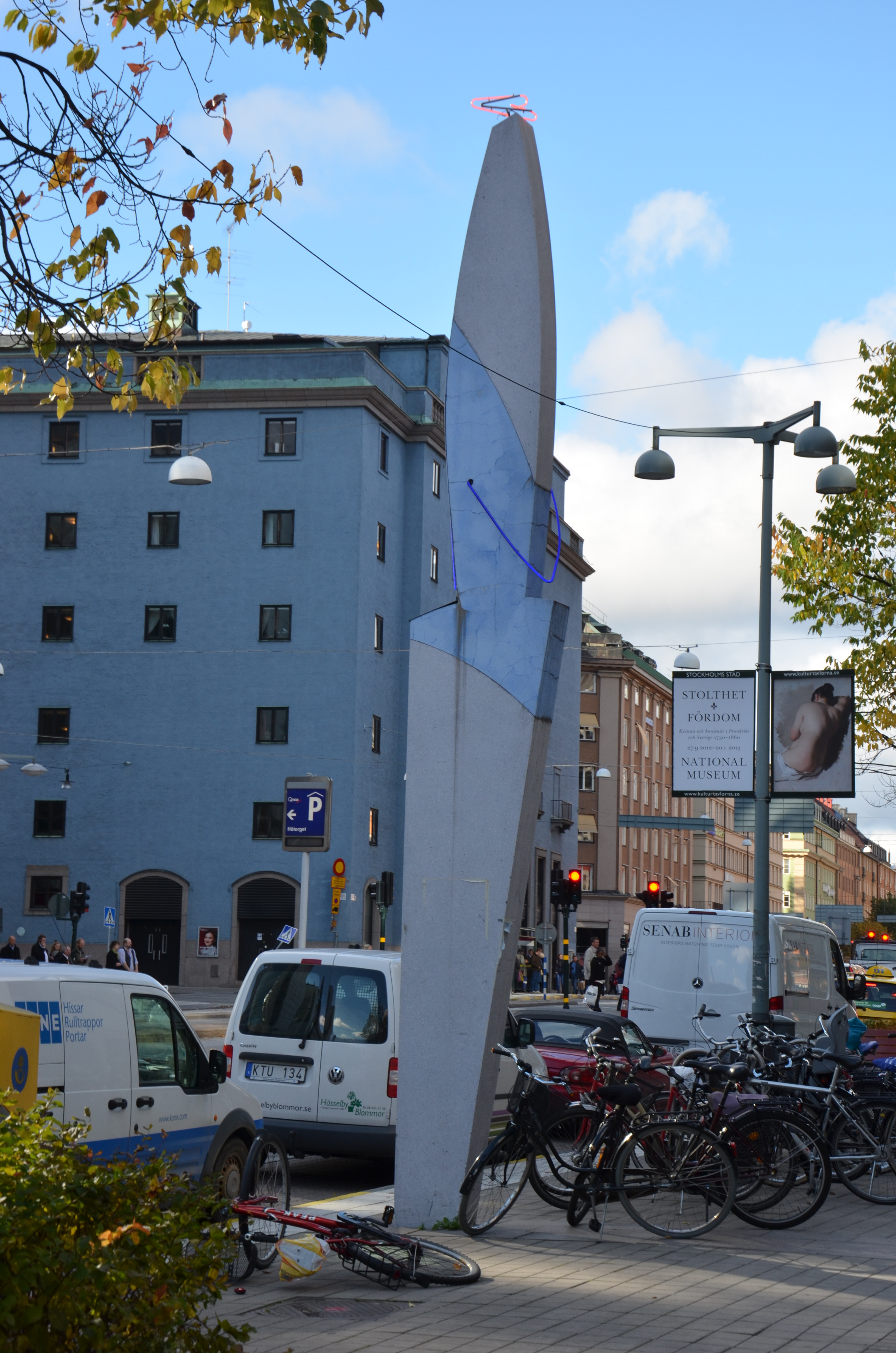 Gun Gordillos Skulptur med neon, 1998, Sveavägen i Stockholm.